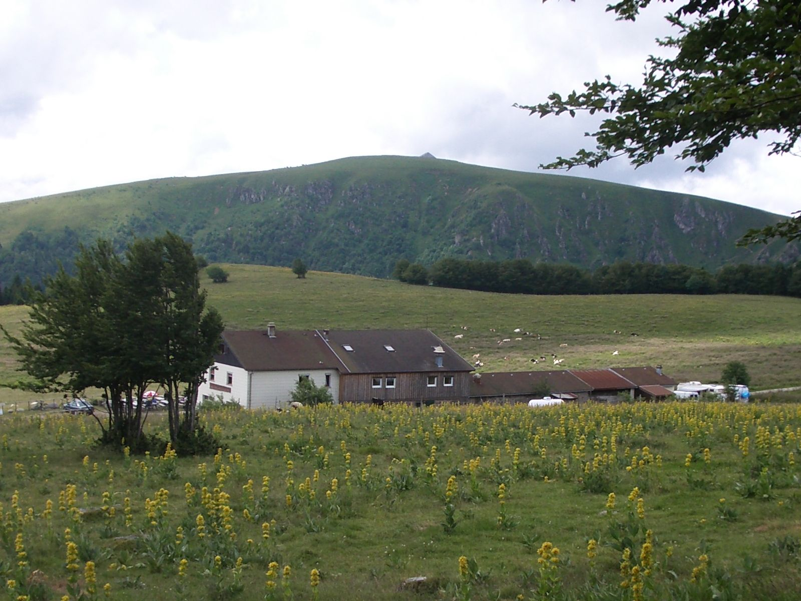 Deutch : Beschreibung: Der Hohneck von Norden aus (Gasthaus trois fours) am 9. Juli 2005 Quelle: selbst fotografiert Fotograf: Thorsten Schlachter